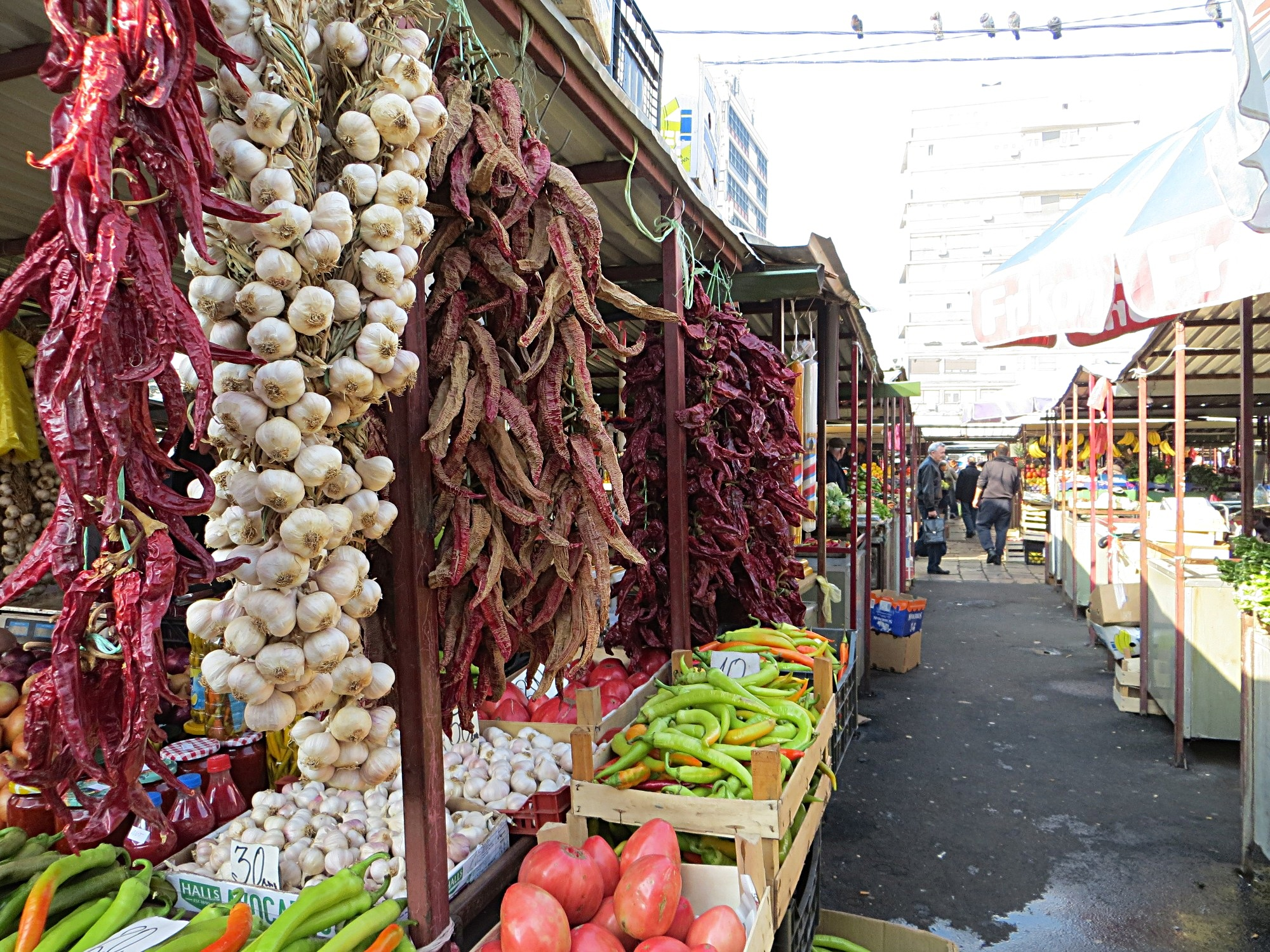 Kalenić pijaca